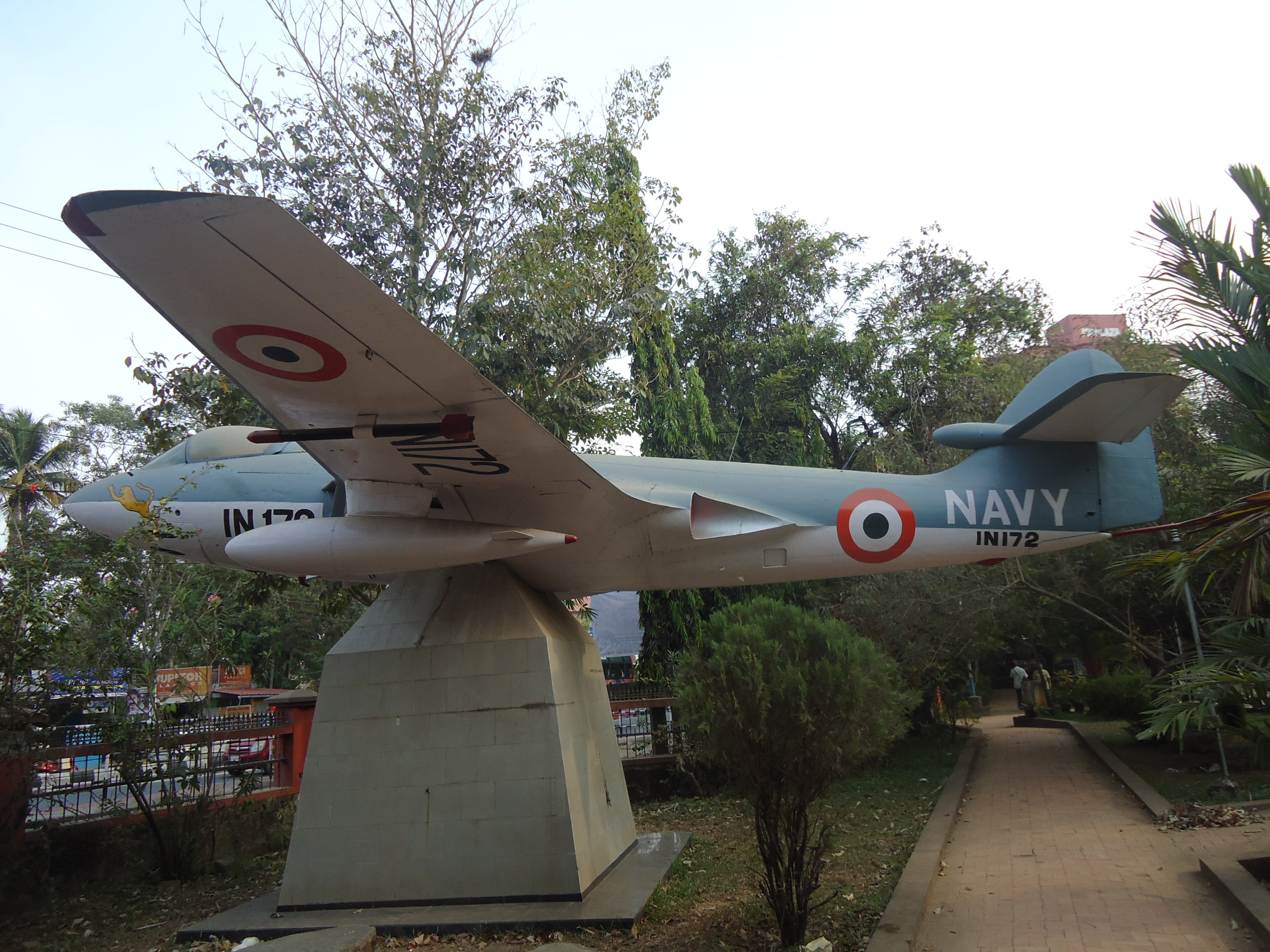 Sea Hawk Plane Changampuzha Park Edappilly